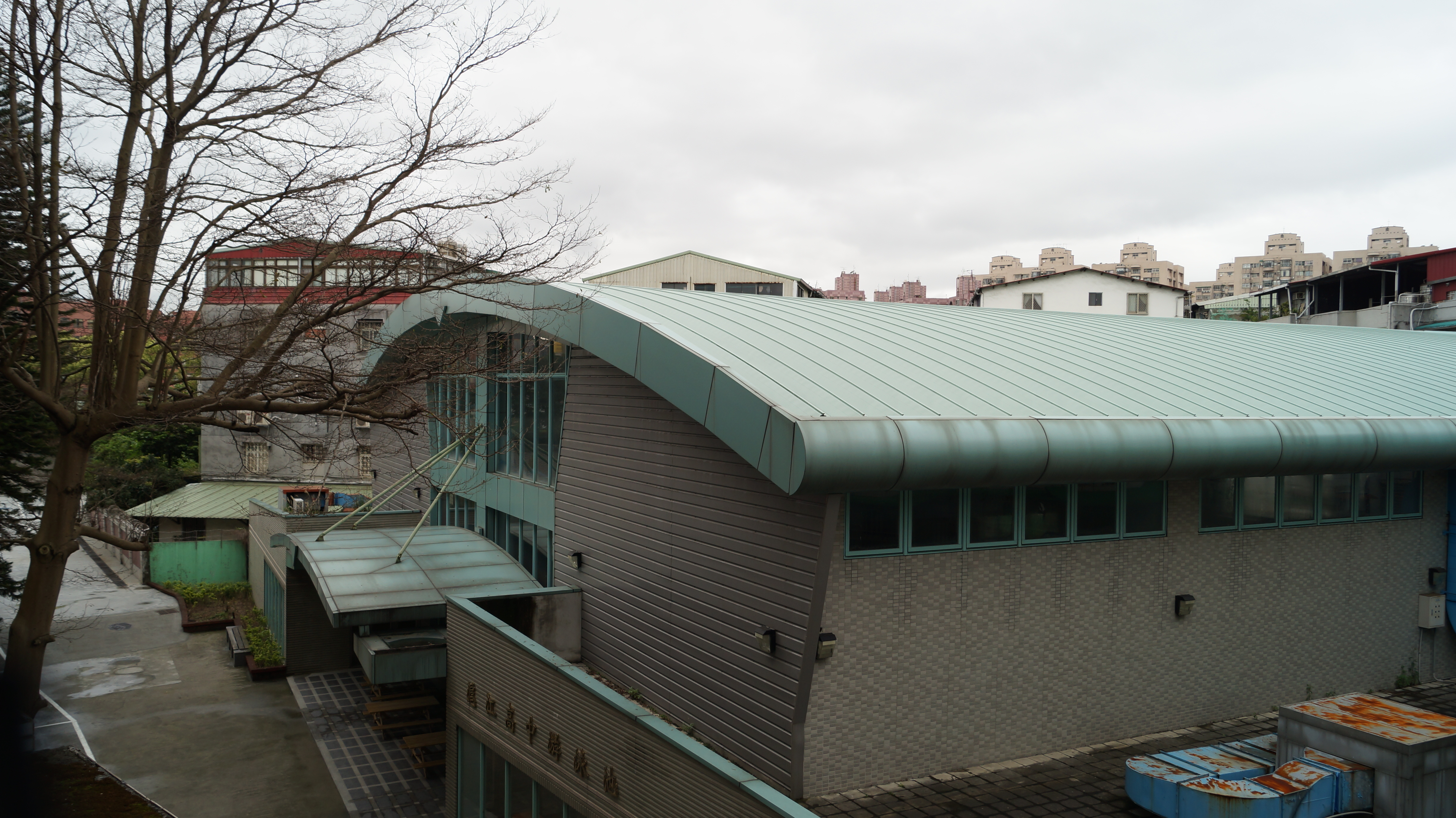 中文（台灣）: 臺北市私立滬江高級中學游泳池